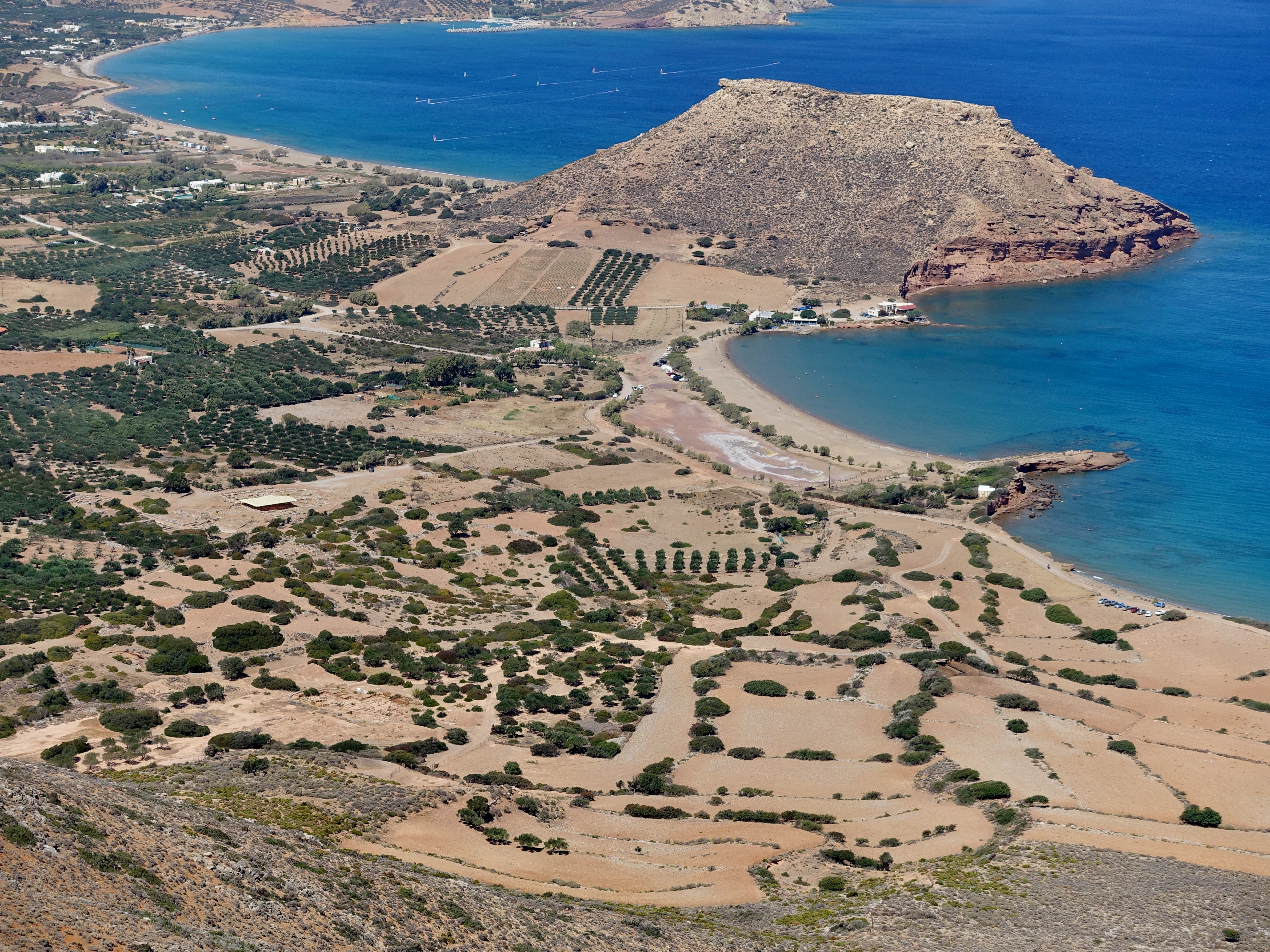 Ausgrabungsstätte von Roussolakkos (Ρουσσόλακκος) vor dem Strand Chiona nahe Palekastro, Gemeinde Sitia, Kreta, Griechenland